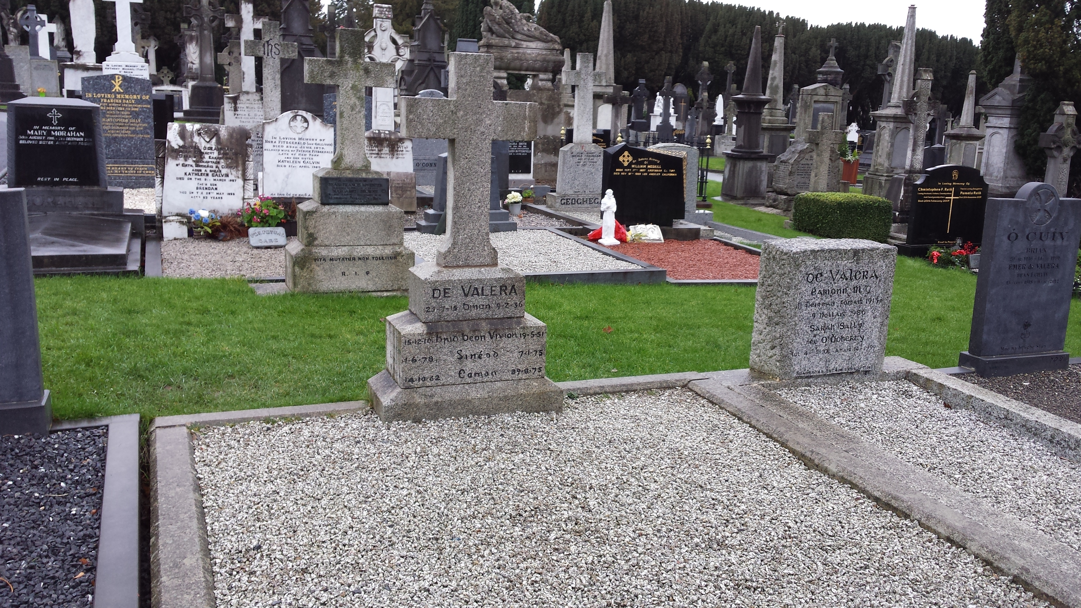 Tomba d'Éamon de Valera